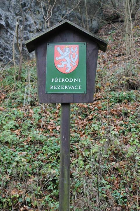 Označení PR Čertovy skály...